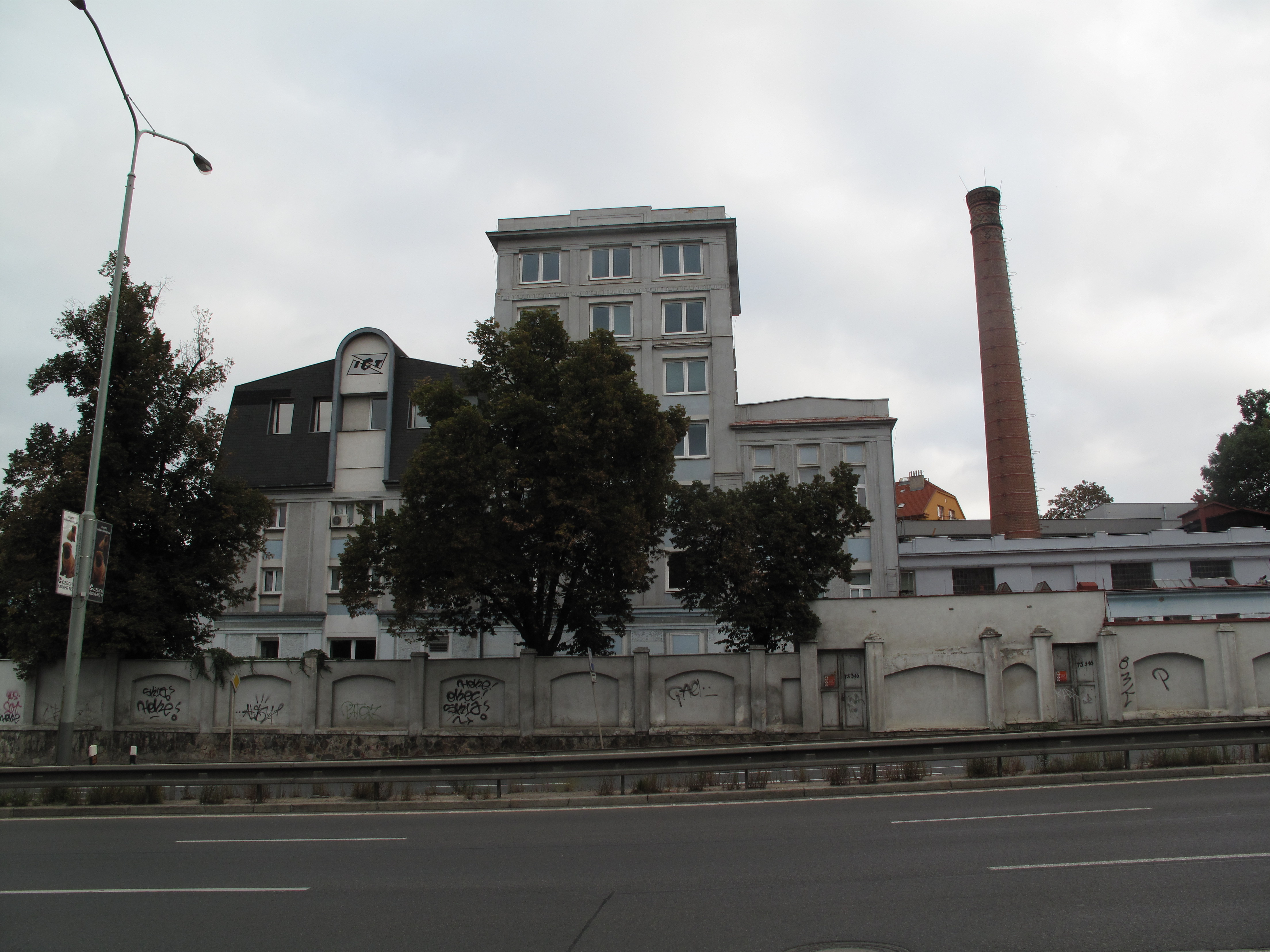 Okolí zastávky Vychovatelna